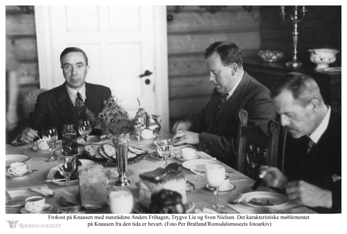 Regjeringsmedlemmene Anders Frihagen, Trygve Lie og Sven Nielsen på Knausen Hotell.